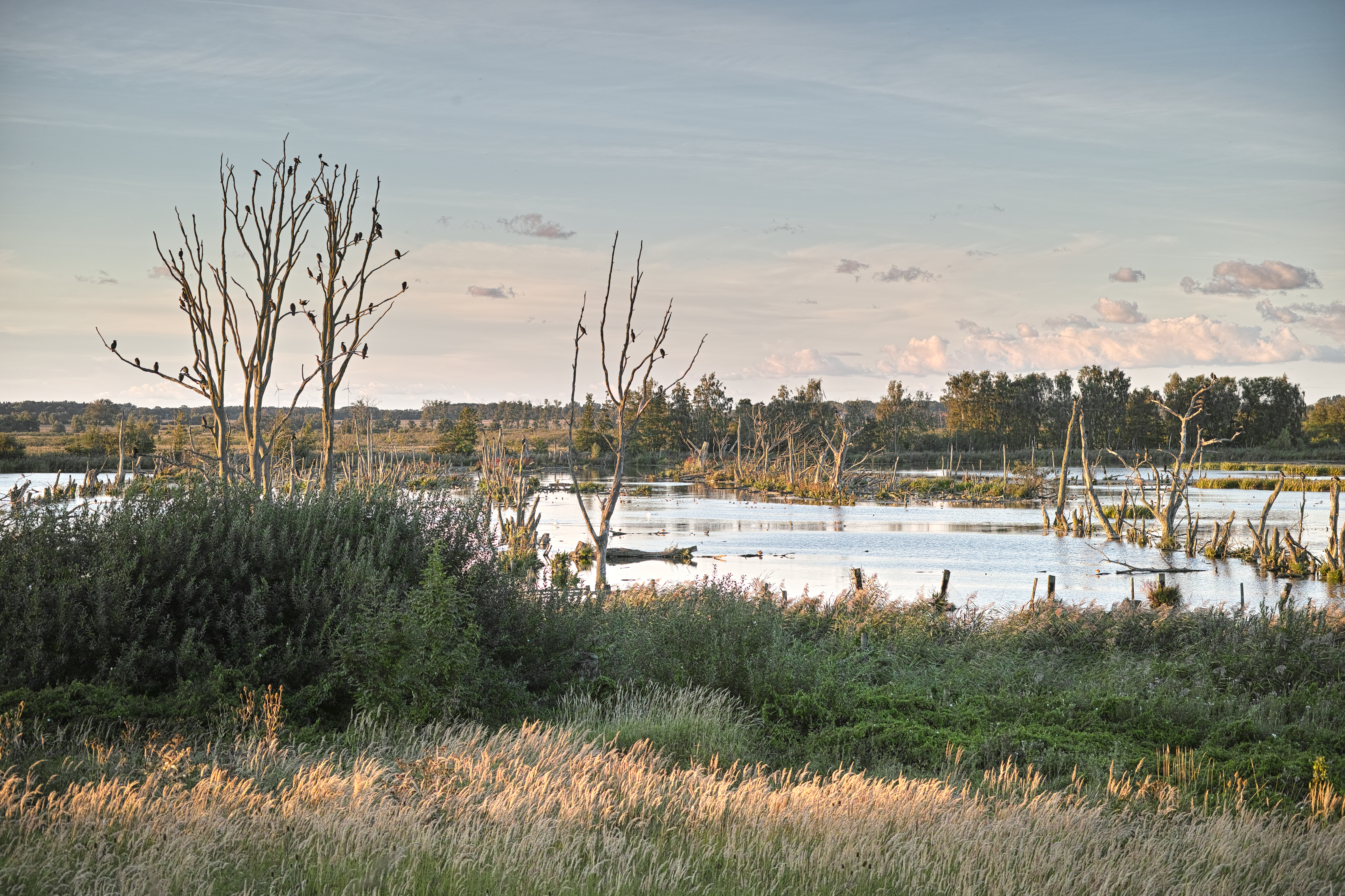 Abends an der Peene im Naturschutzgebiet „Peenetal von Jarmen bis Anklam“ bei Anklam, Naturpark Flusslandschaft Peenetal